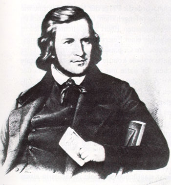 August Heinrich Hoffmann von Fallersleben (1798–1874), Germanist und Dichter